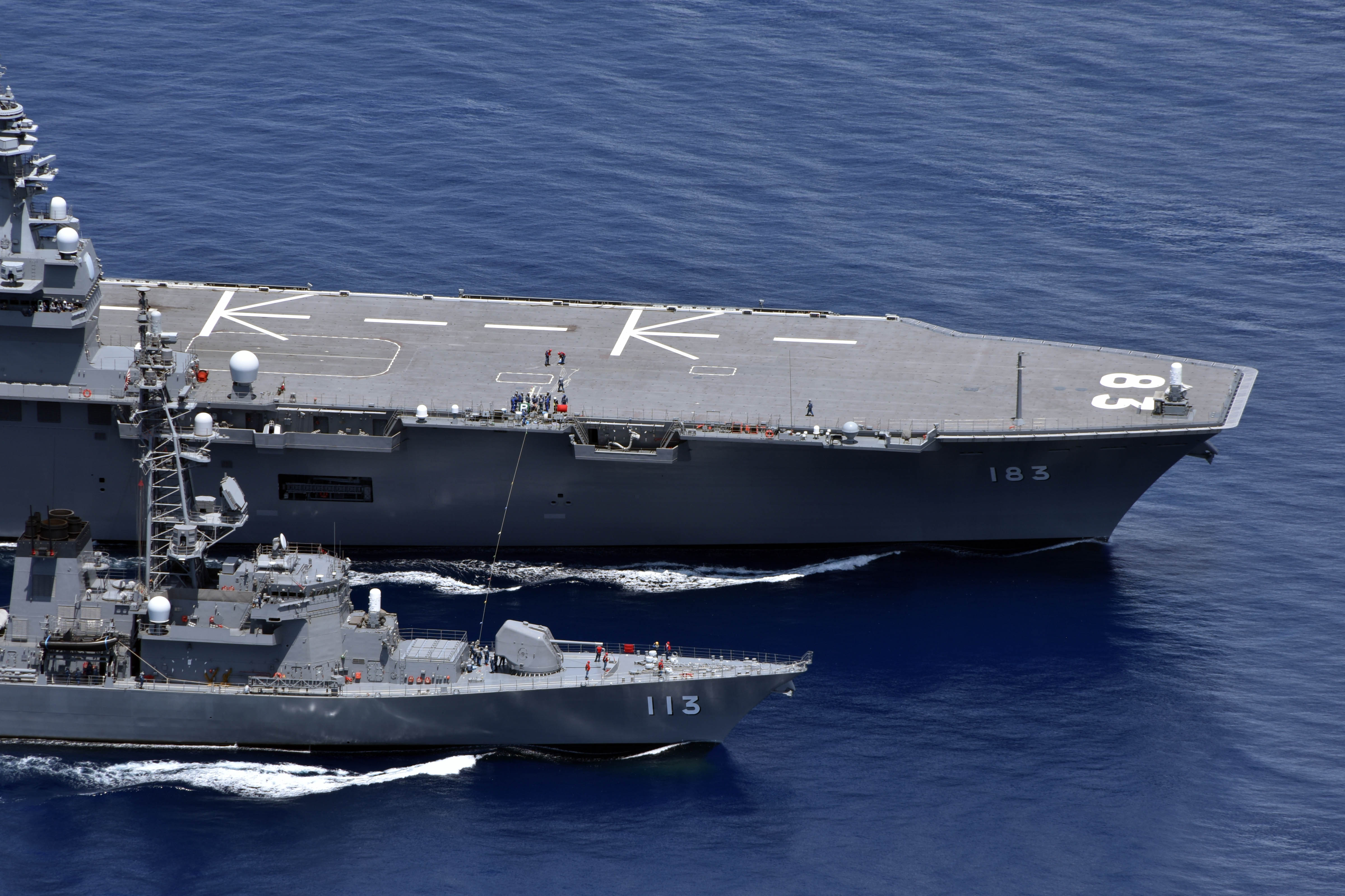 DDH-183 いずも と DD-113 さざなみ